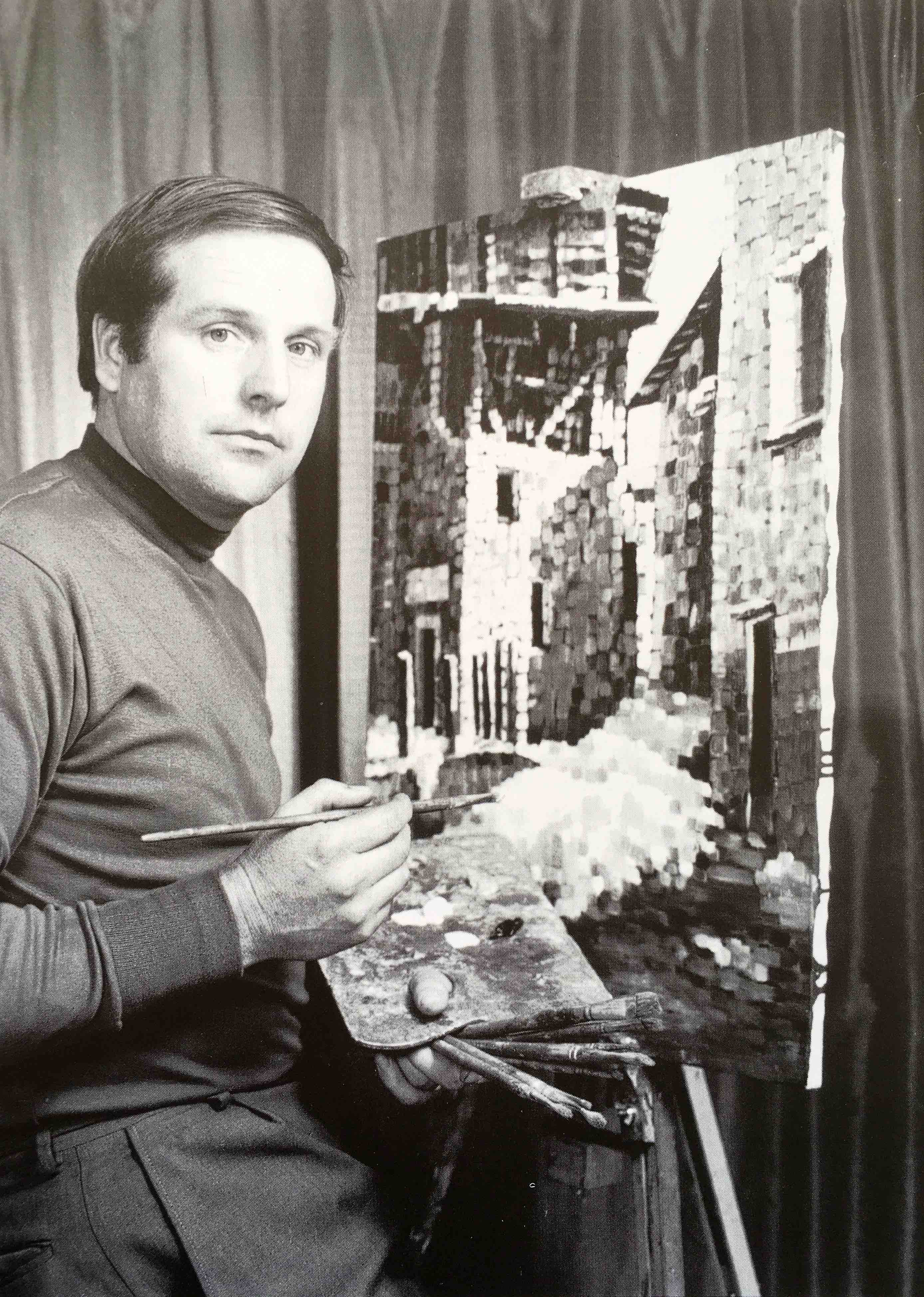 Silvano Nebl